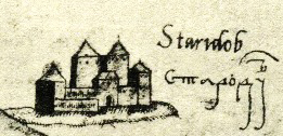 Беларуская (тарашкевіца): Старадуб (Staradub)